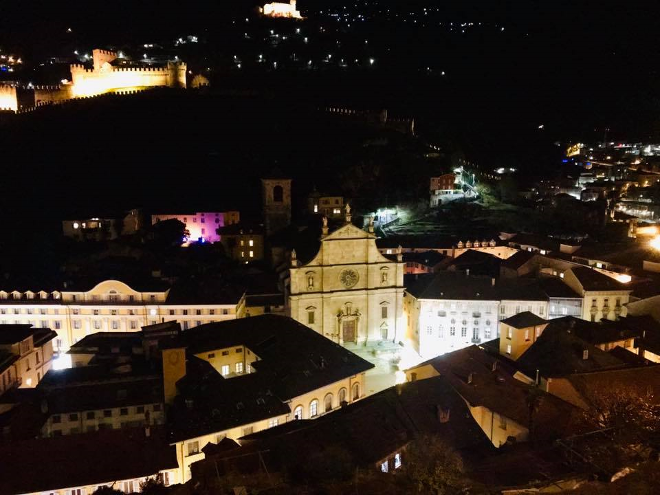 Collegiata, Montebello e centro storico Bellinzona